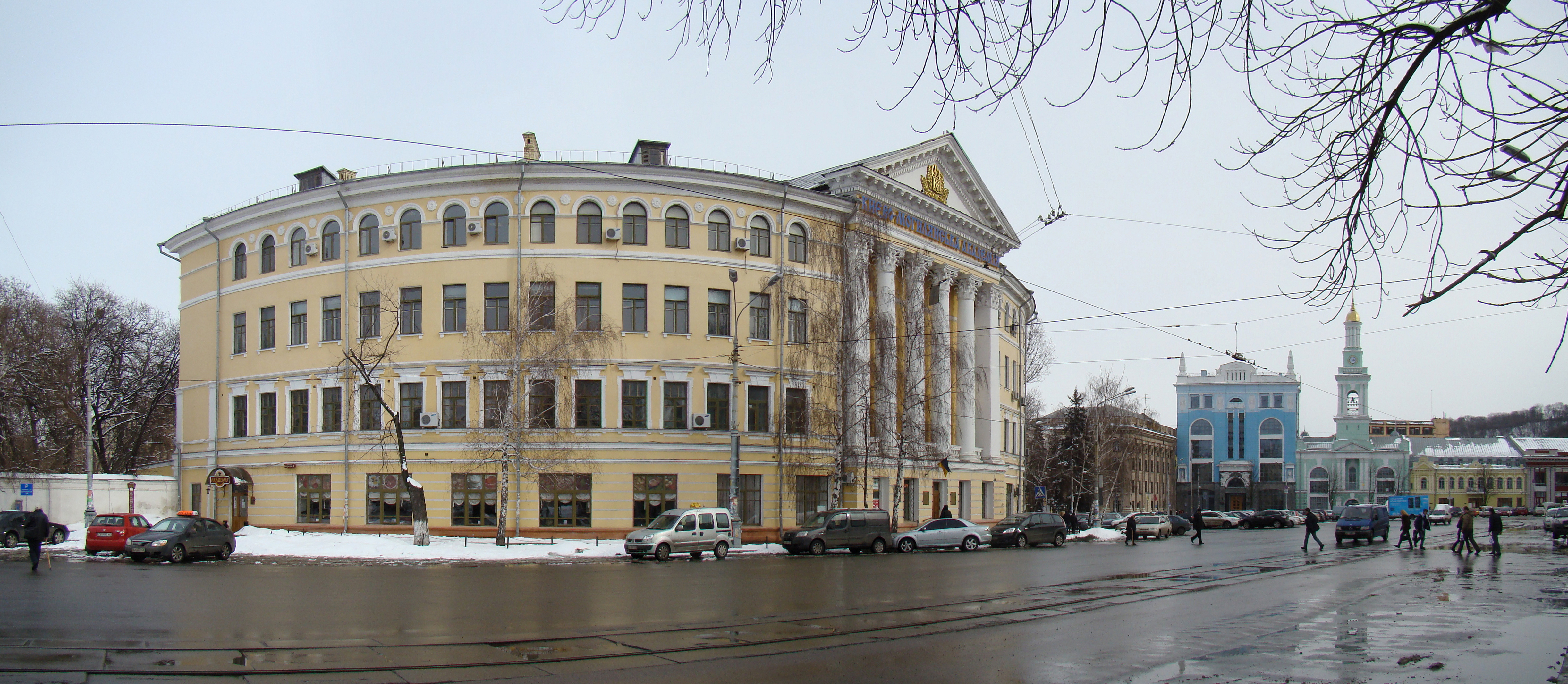 Будинок з крамницями, в якому у 1941 р. містився штаб Дніпровської військової флотилії, Київ, Контрактова пл., 3